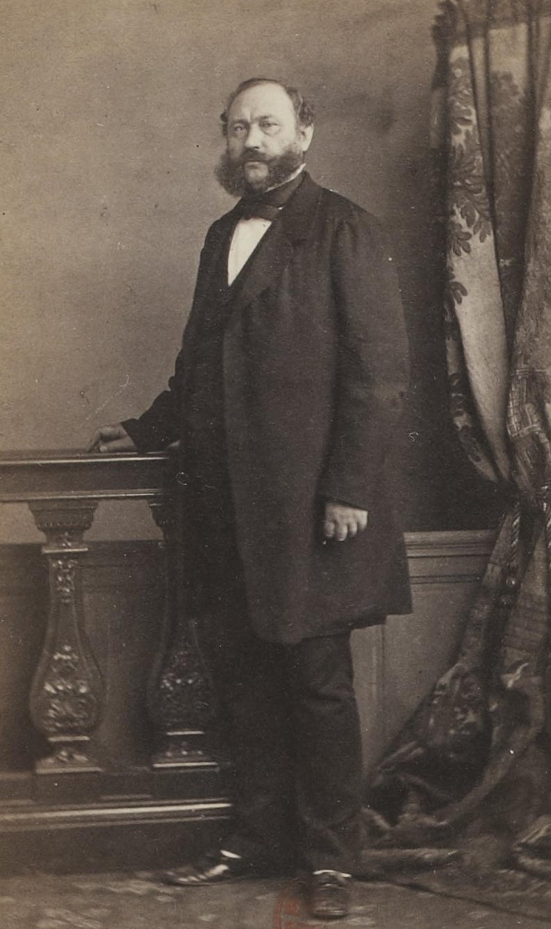 Album des députés au Corps législatif entre 1852-1857.